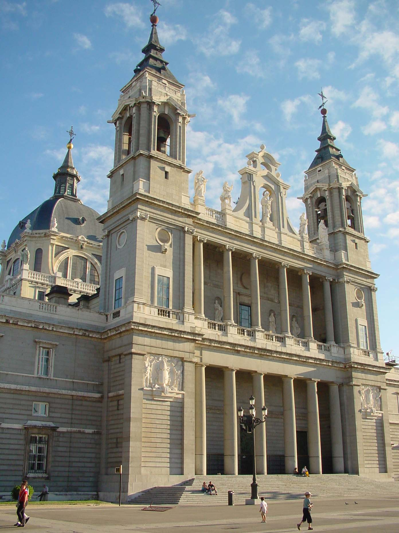 Catedral de Santa María de la Real de la Almudena en Madrid